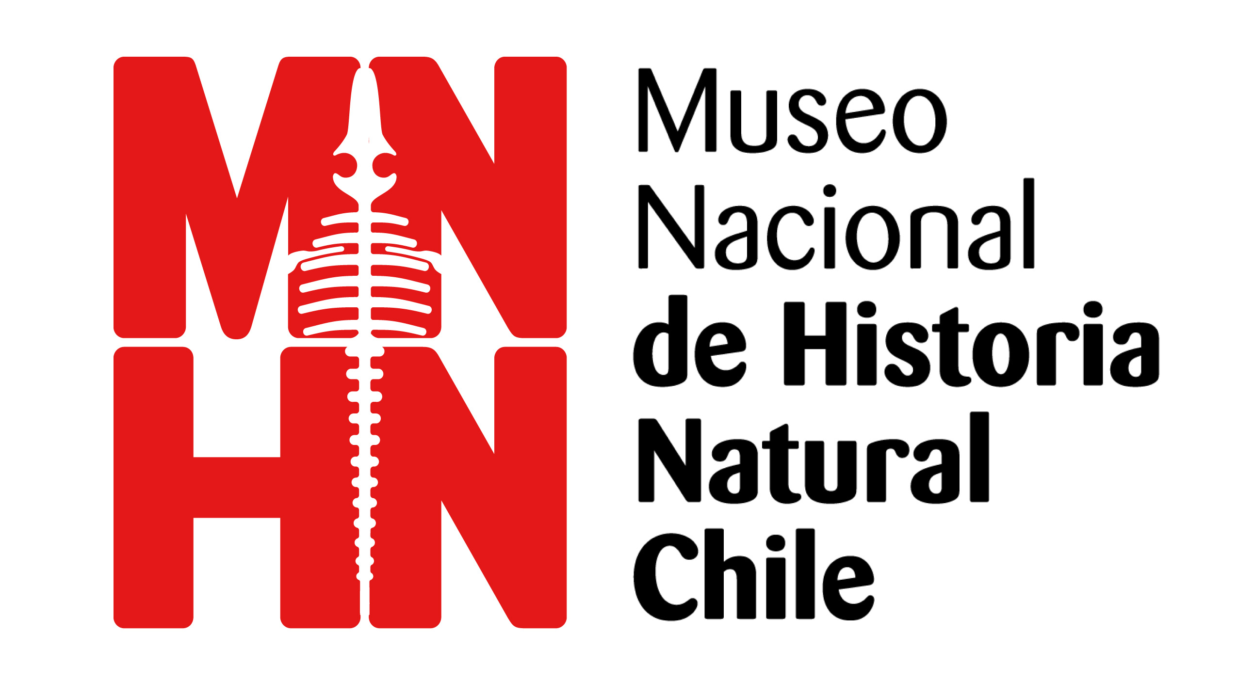 Logo Museo Nacional de Historia Natural (2011)